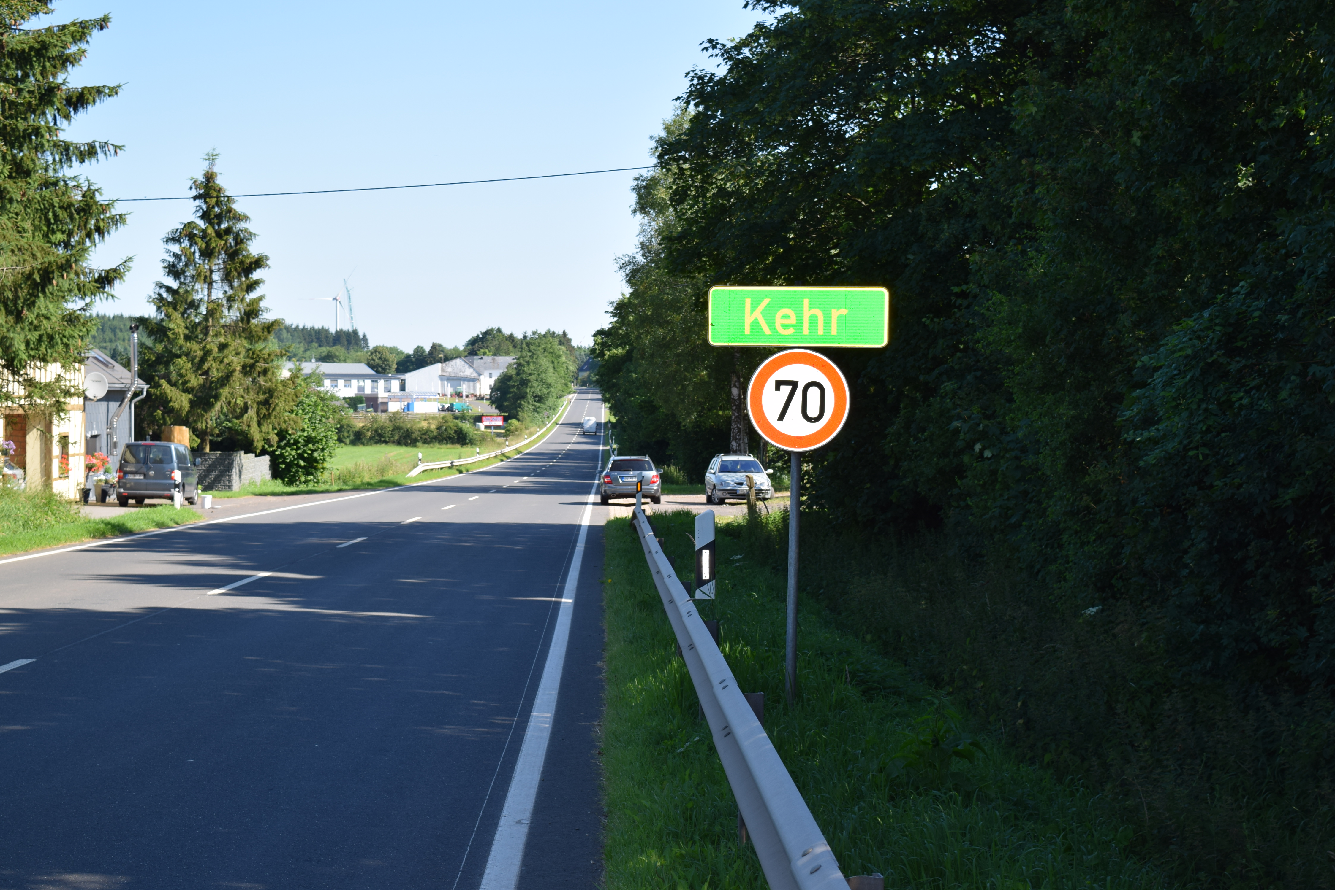 Kehr an der deutsch-belgischen Grenze